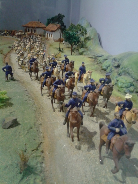 El Ejército Expedicionario de Costa Rica marcha al frente de batalla durante la Campaña Nacional de 1856-1857. Diorama del Museo Histórico Cultural Juan Santamaría, Alajuela, Costa Rica.